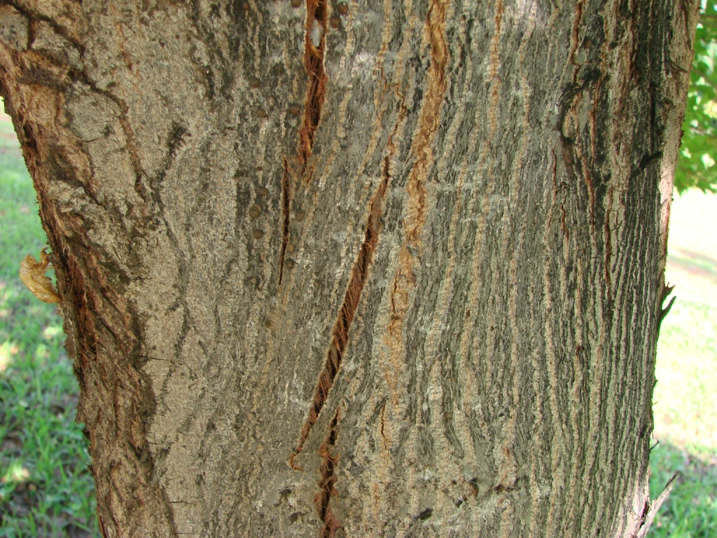 Guazuma ulmifolia Lam. (Sin. het. Guazuma tomentosa Kunth) - MALVACEAE - APA do Planalto Central - Brasília - Distrito Federal - Brasil.